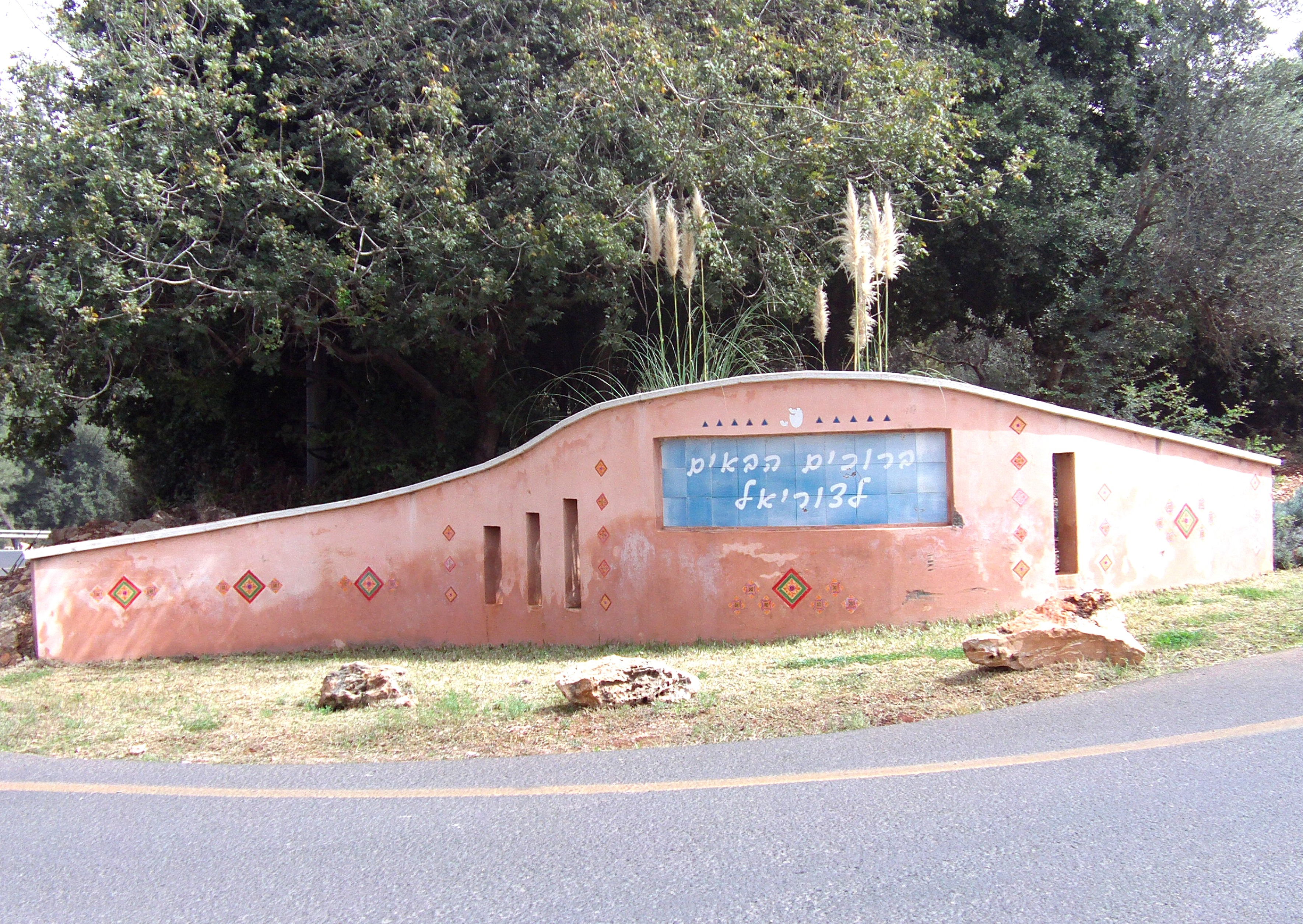 אוטובוסים של מועצות איזוריות הכניסה למושב